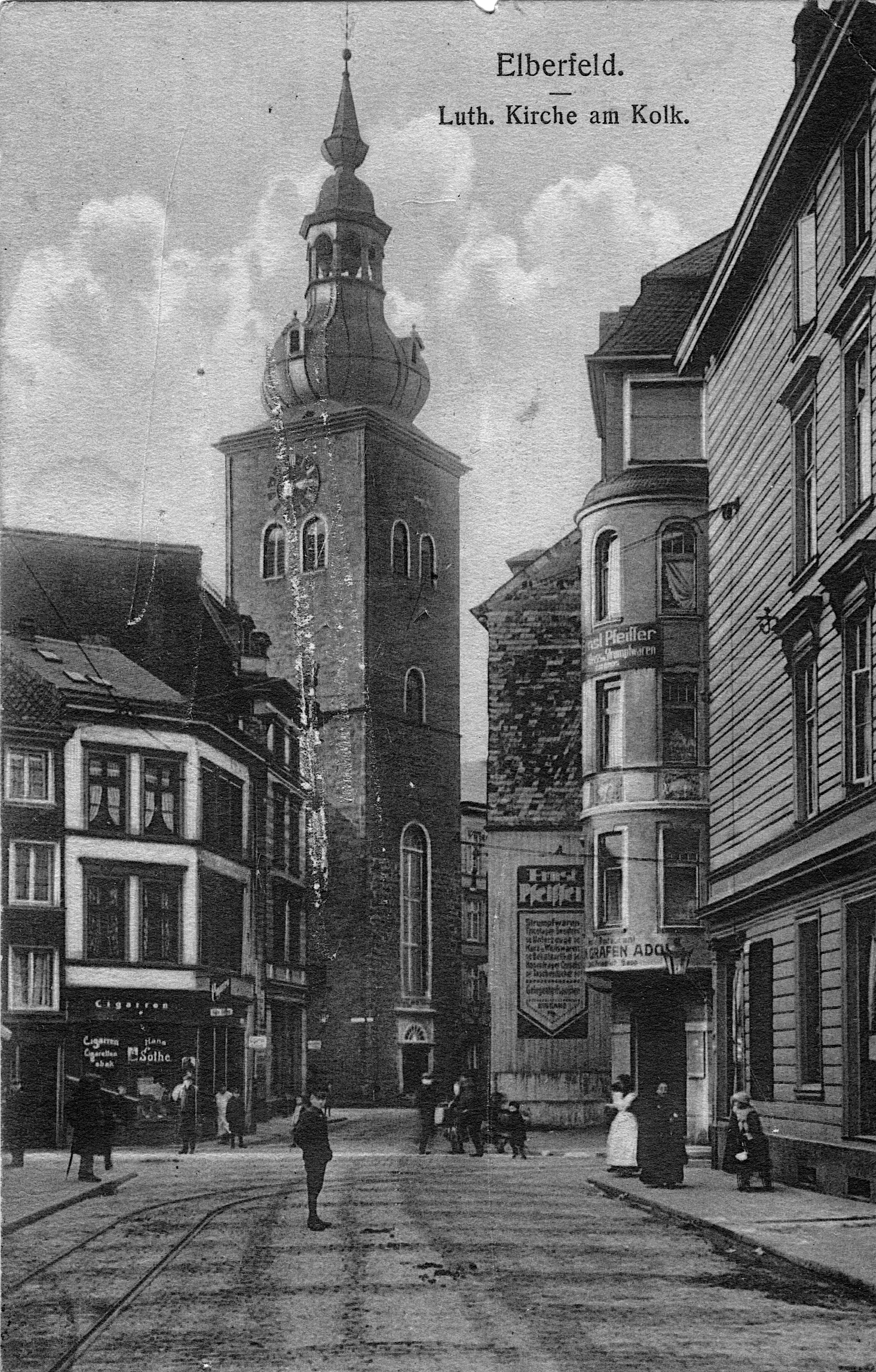 Ansicht der Alten lutherischen Kirche am Kolk in Elberfeld 1919